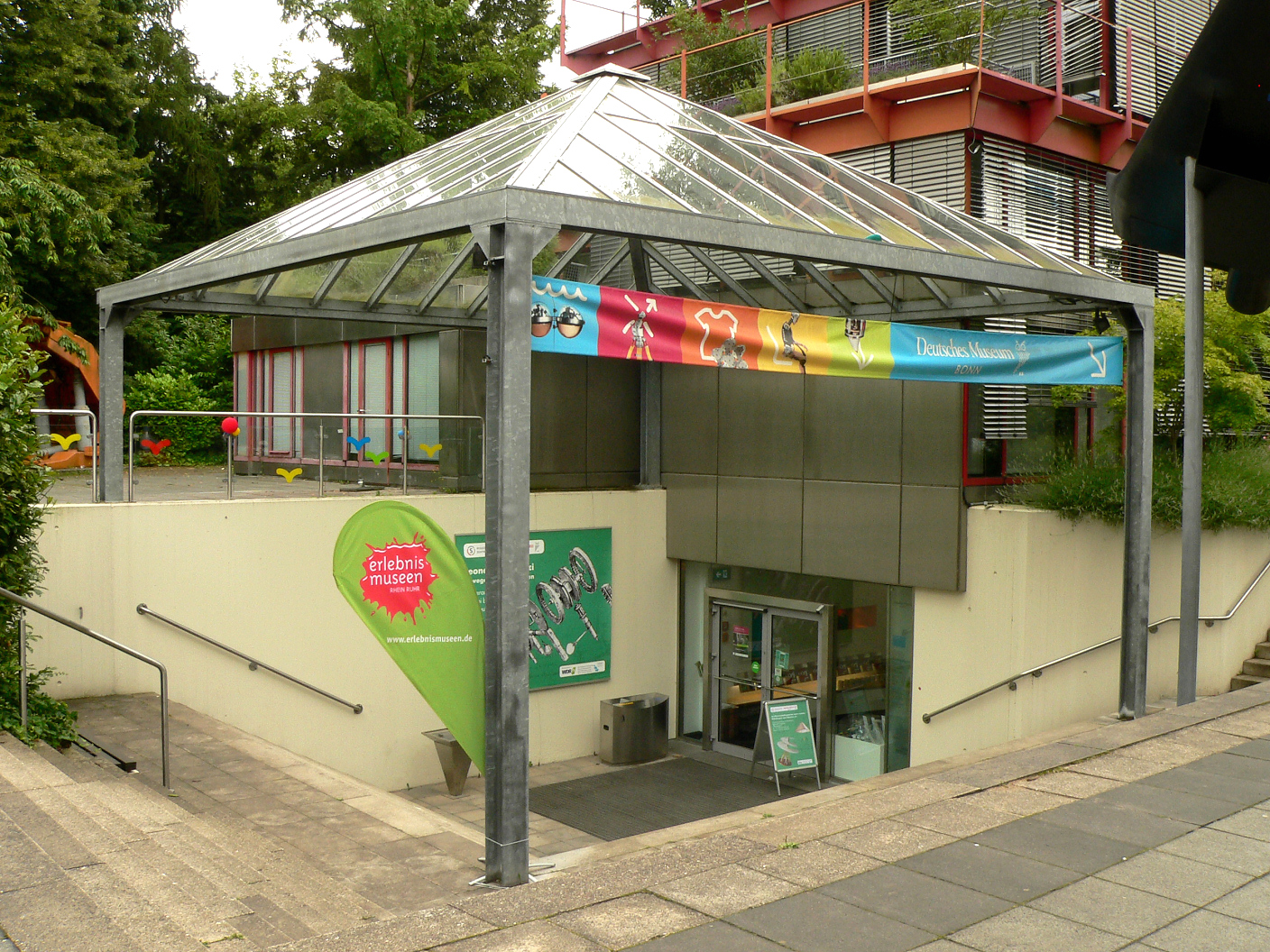 Deutsches Museum Bonn, Museumseingang